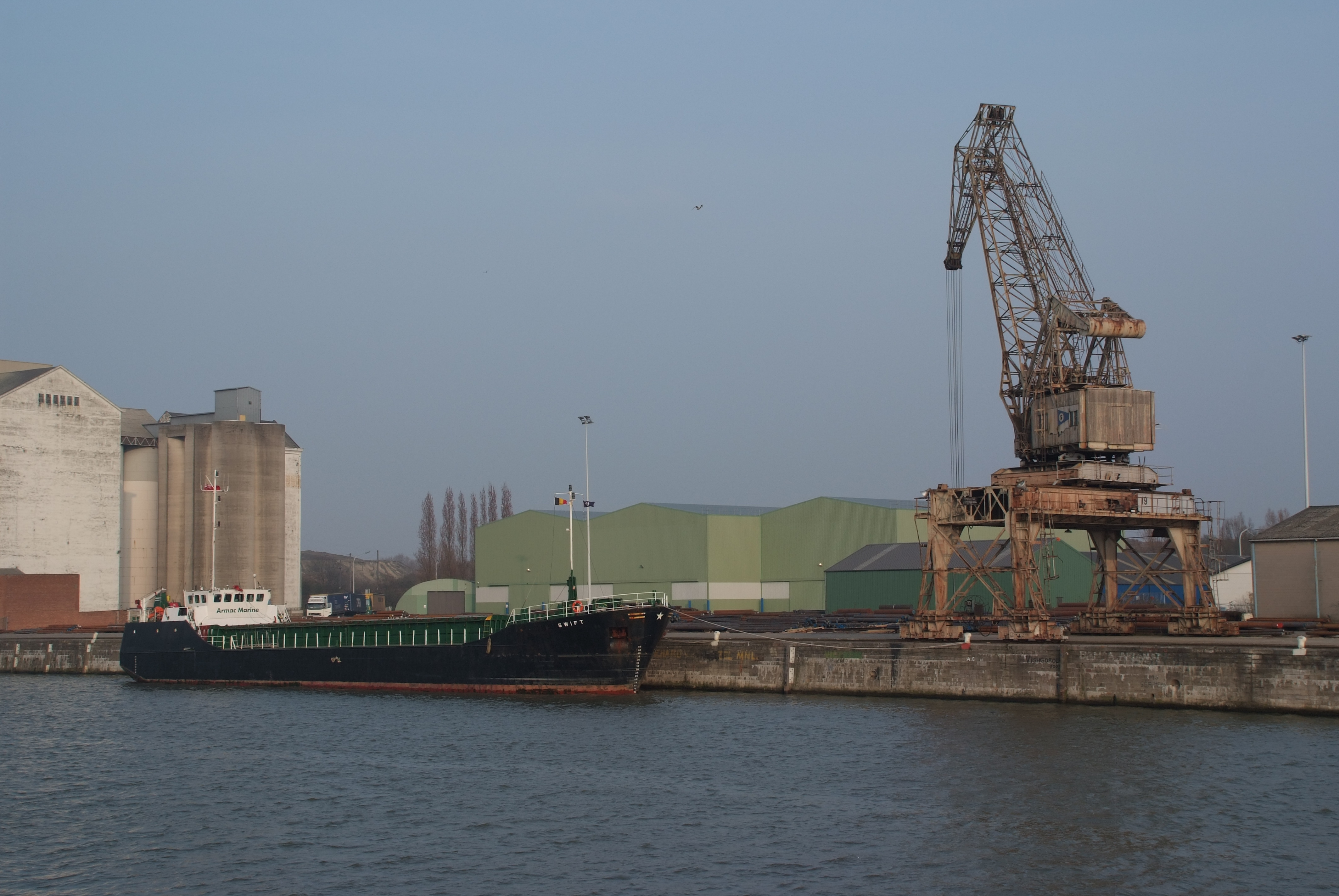 Kustvaarder Swift in de haven van Brussel